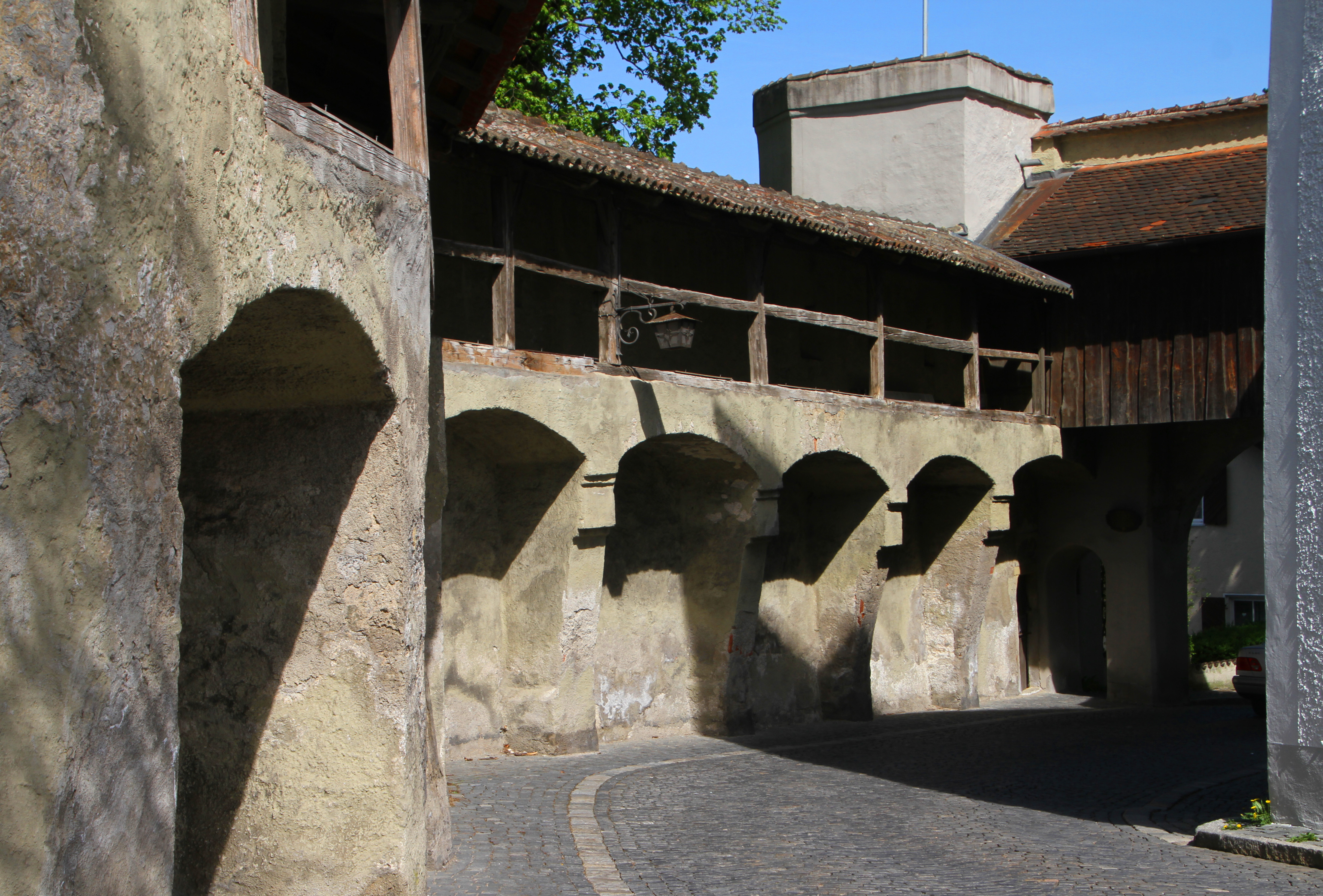 Schongau, Maxtor